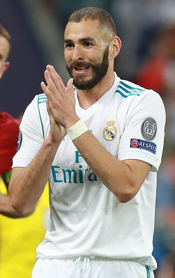 Финал ЛЧ в Киеве: 13-й кубок «Реала» и слёзы «Ливерпуля»